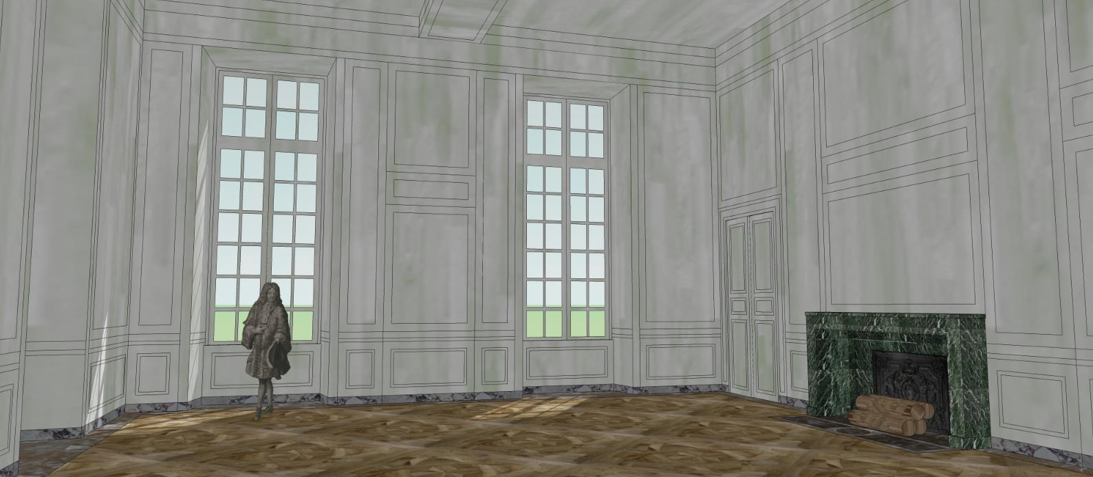 Proposition de restitution de la salle des gardes de l'appartement de Monseigneur au château-vieux de Meudon, vers 1700-1792.